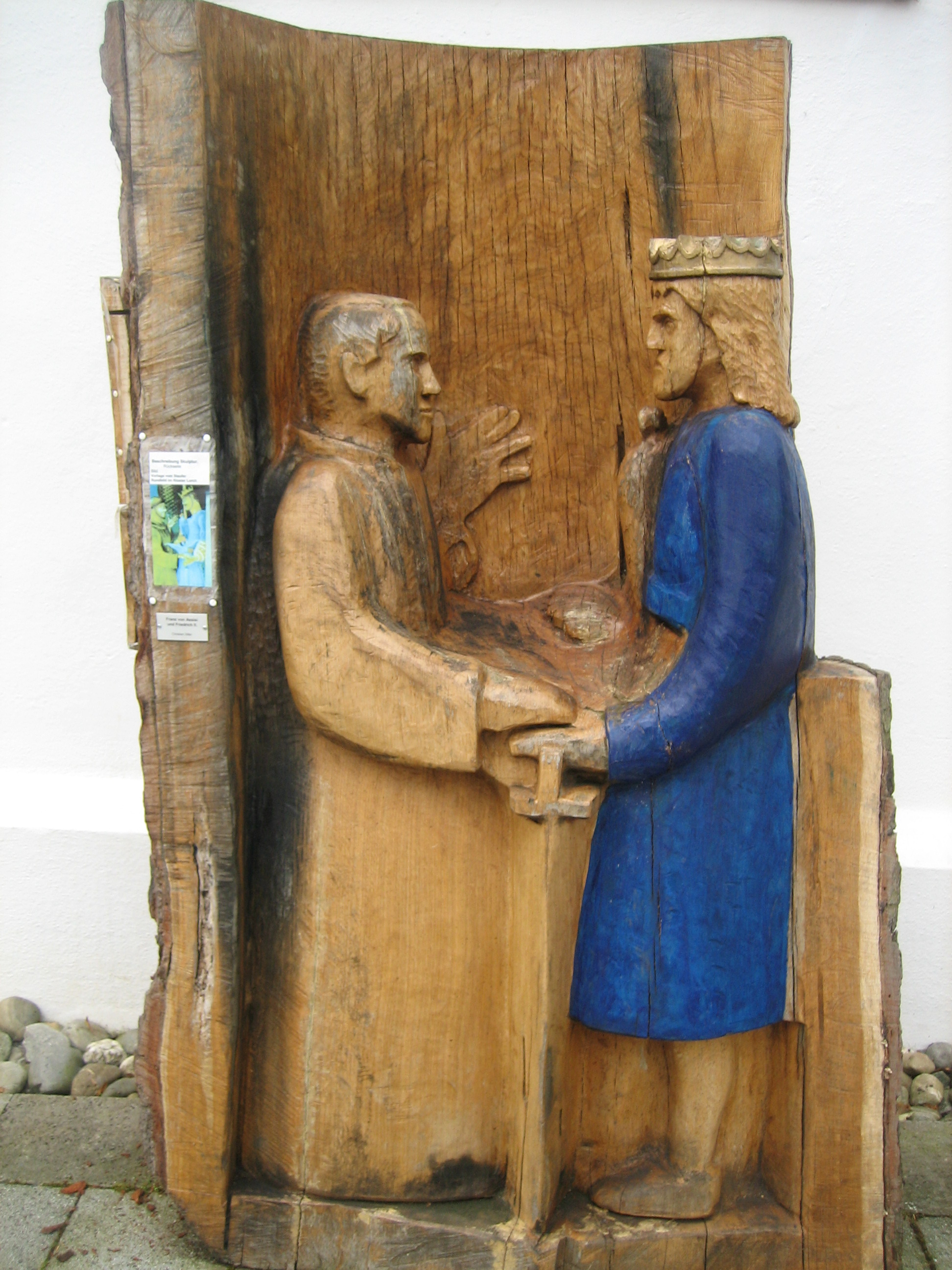 Kirchenpatrone Cyriakus und Gangolf vor der Kirche St. Sebastian Ottenbach